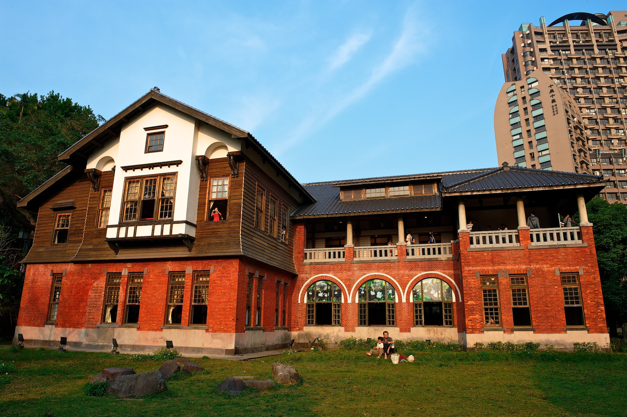 北投溫泉的利用，大約始於日據初期，於一九一三年，由官方主導興建的這座規模完備的大浴場，號稱當時東亞最大的溫泉浴場，這座建築的出現，也象徵著北投溫泉鄉發展高峰的來臨，並見證了臺灣溫泉文化史的一頁。建築的構造以磚木及鋼筋混凝土完成，一樓用櫥窗，二樓使用雨淋板式的木結構，屋頂為了透氣設有通風窗，整座建築頗似英國的鄉間別墅，外觀典雅，與北投公園融為一體，成為重要一景。 北投溫泉浴場於一九九八年經地方人士的努力，成為國定三級古蹟，並進行修復再利用規劃，作為北投溫泉博物館使用，運用溫泉建築之特色，介紹臺灣特有的溫泉浴池，並以展示及解說提供溫泉相關知識。